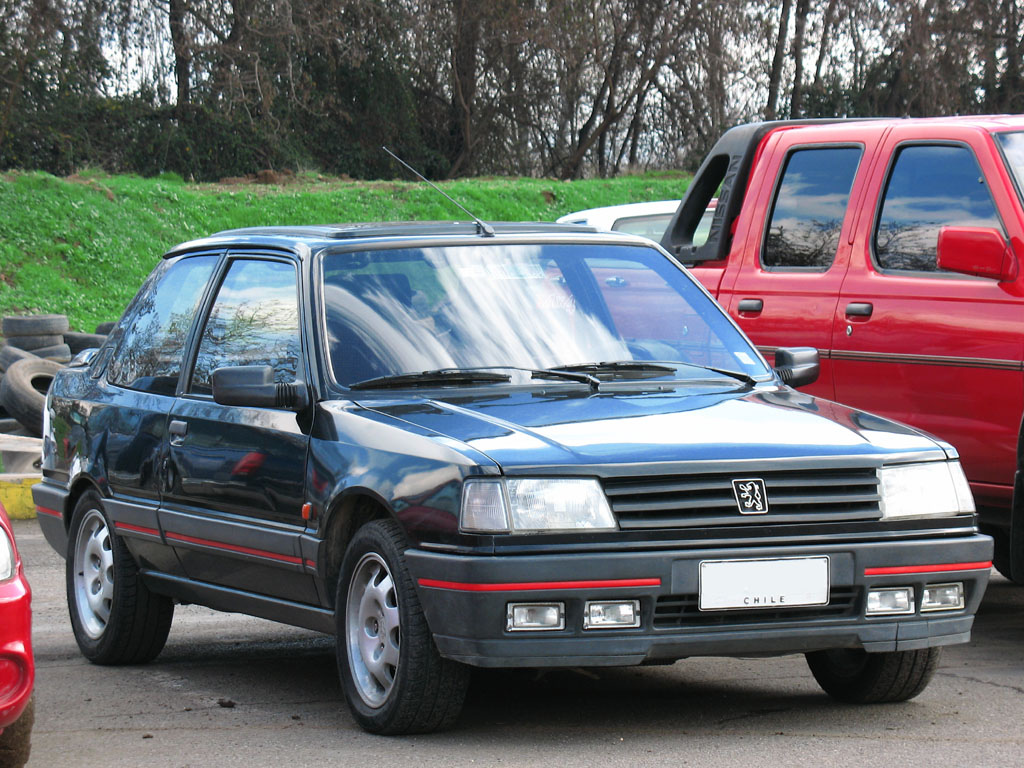 Peugeot 309 GTi 1990